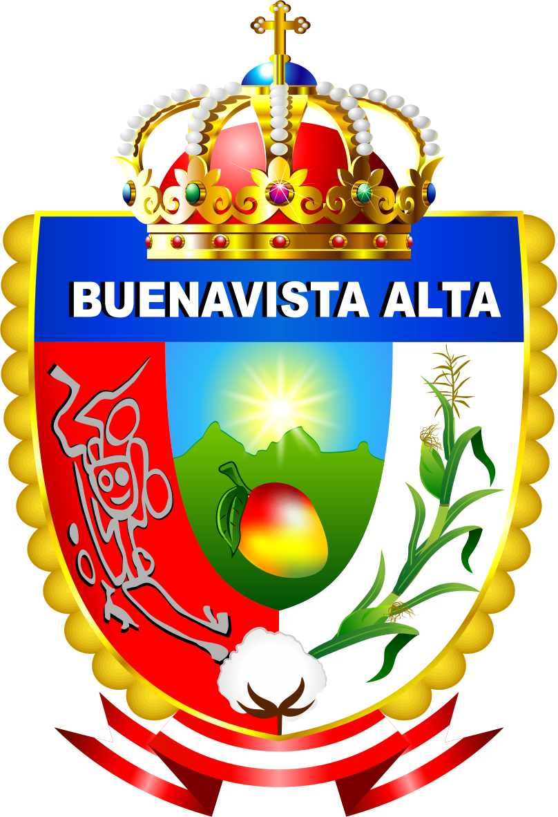 Distrito de Buenavista Alta - Provincia de Casma - Región Ancash